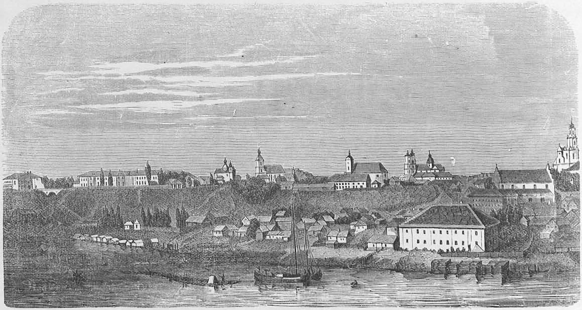 Беларуская (тарашкевіца): Горадня